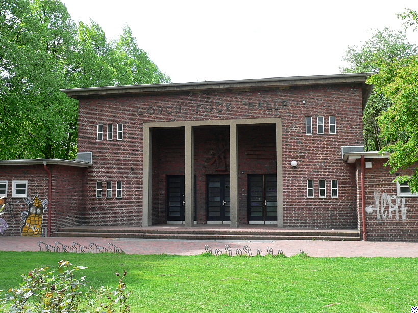 Gorch-Fock-Halle in Hamburg-Finkenwerder